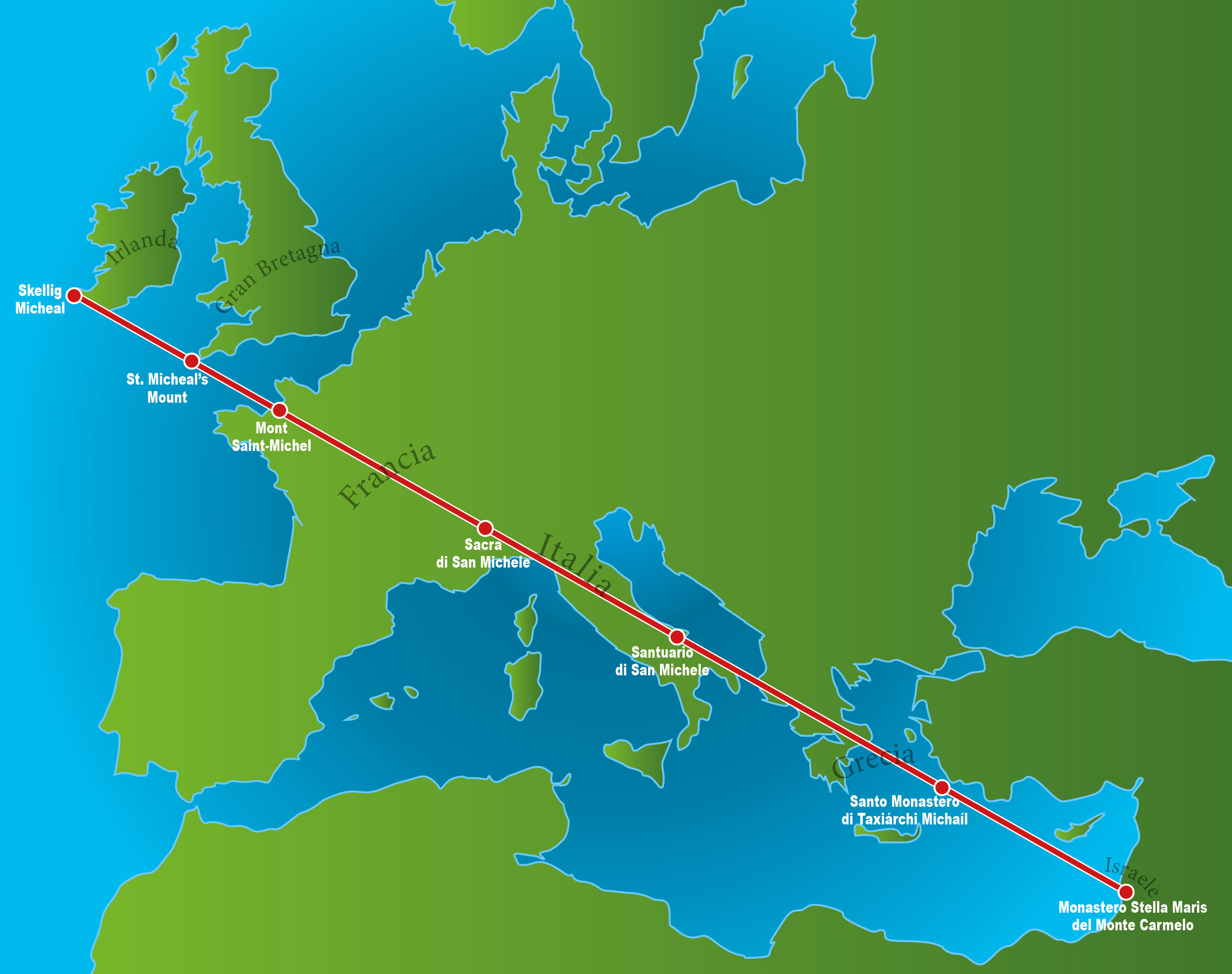 Il tracciato completo della Linea Sacra di San Michele